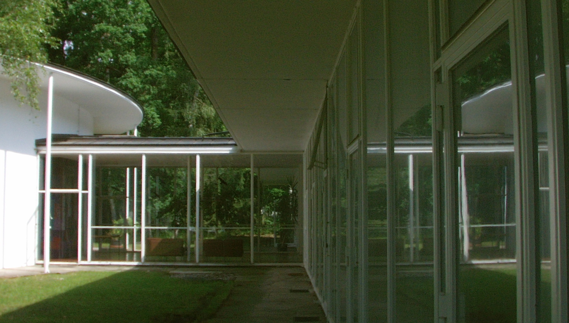 Außenaufnahme